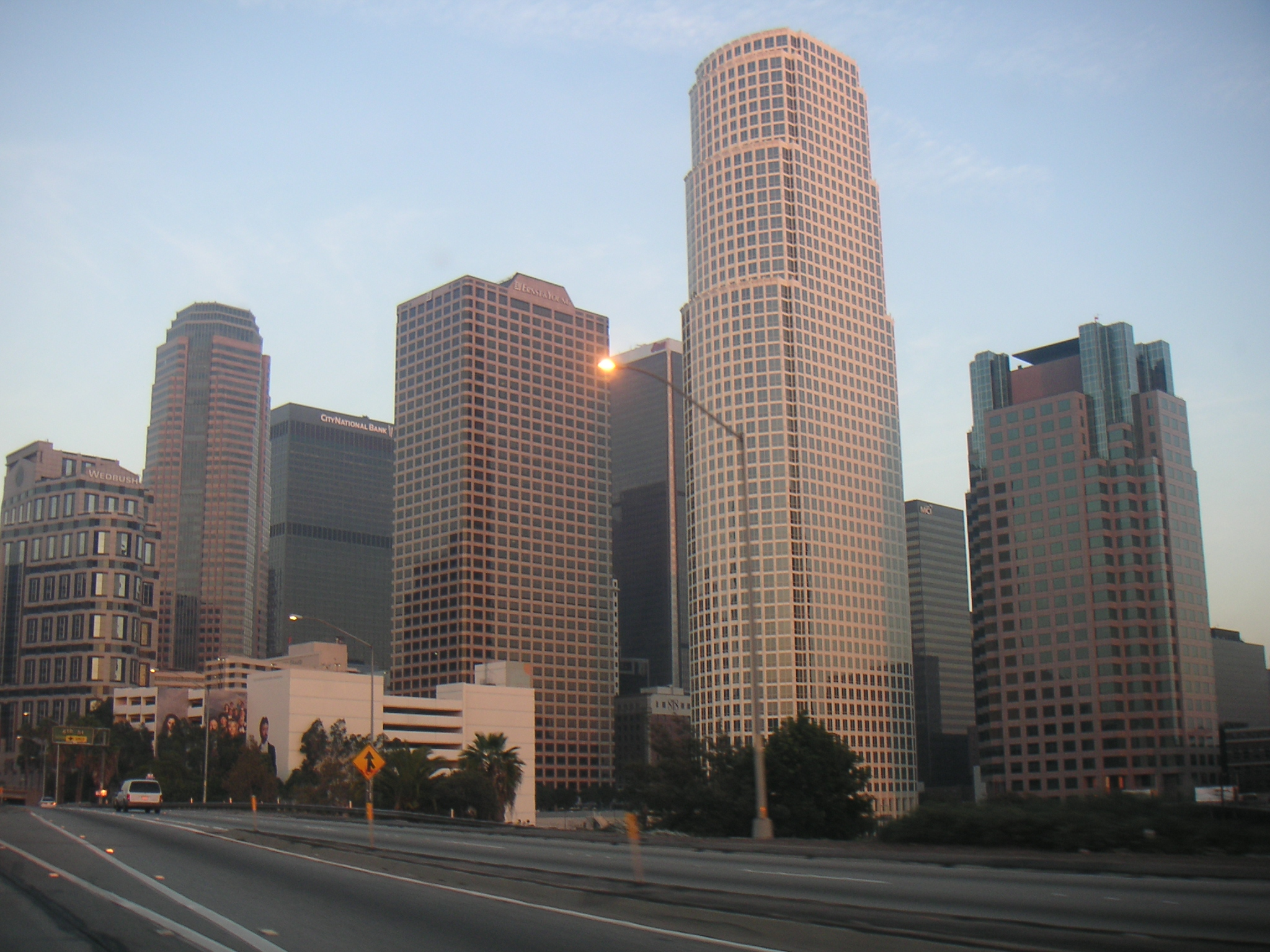 Unimpressive LA Skyline